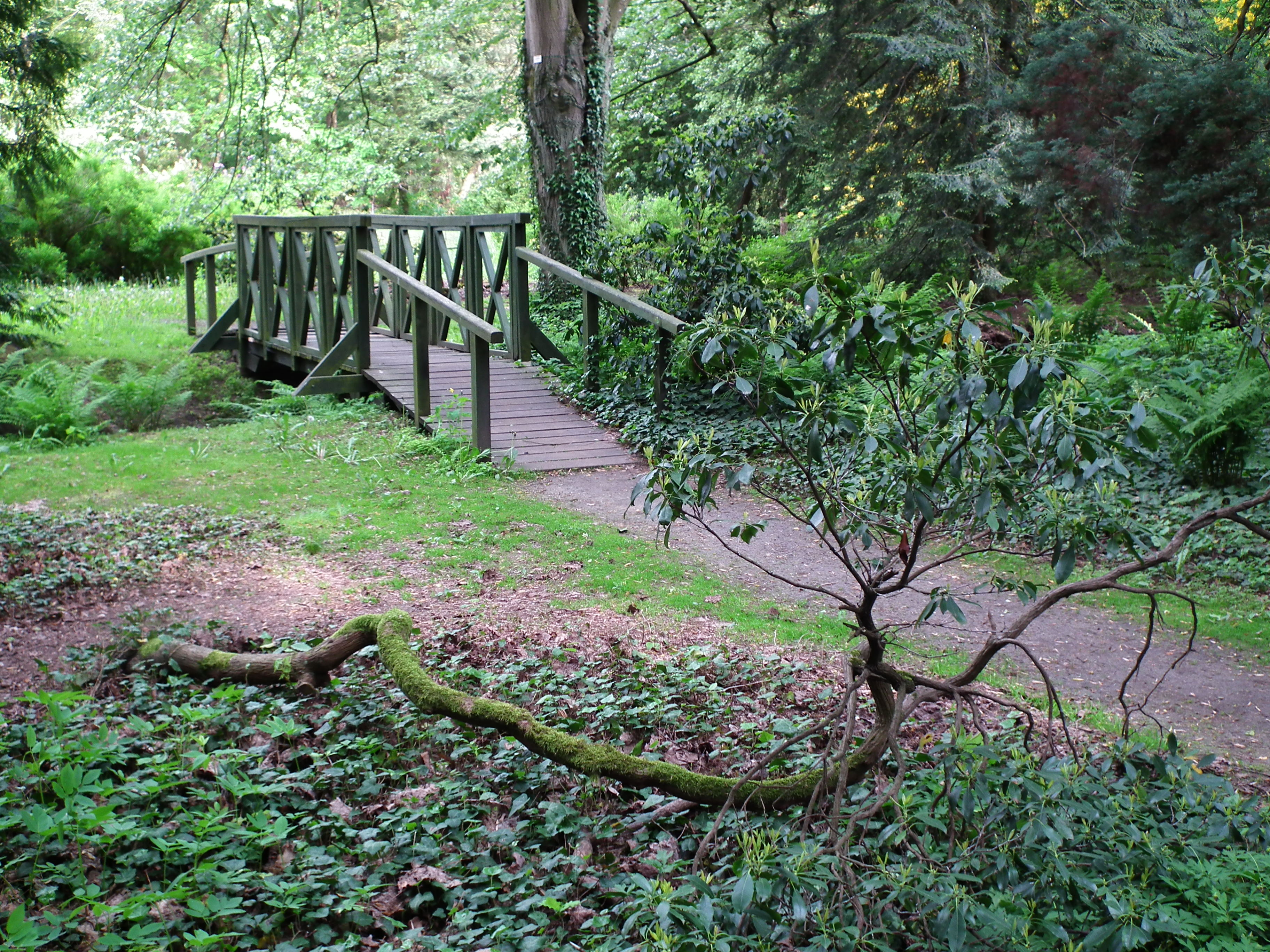 Arboretum w Lipnie pod Niemodlinem.